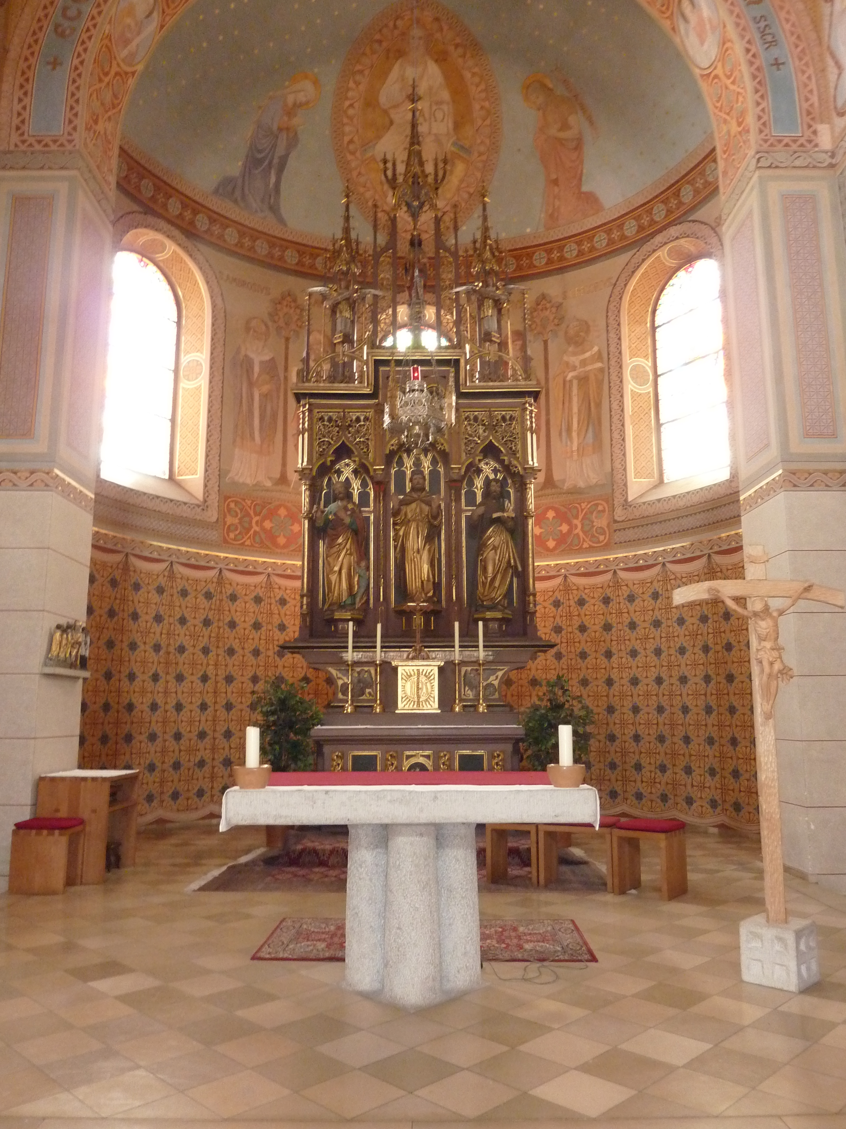 Hochaltar in Mariä Himmelfahrt, Pappenheim